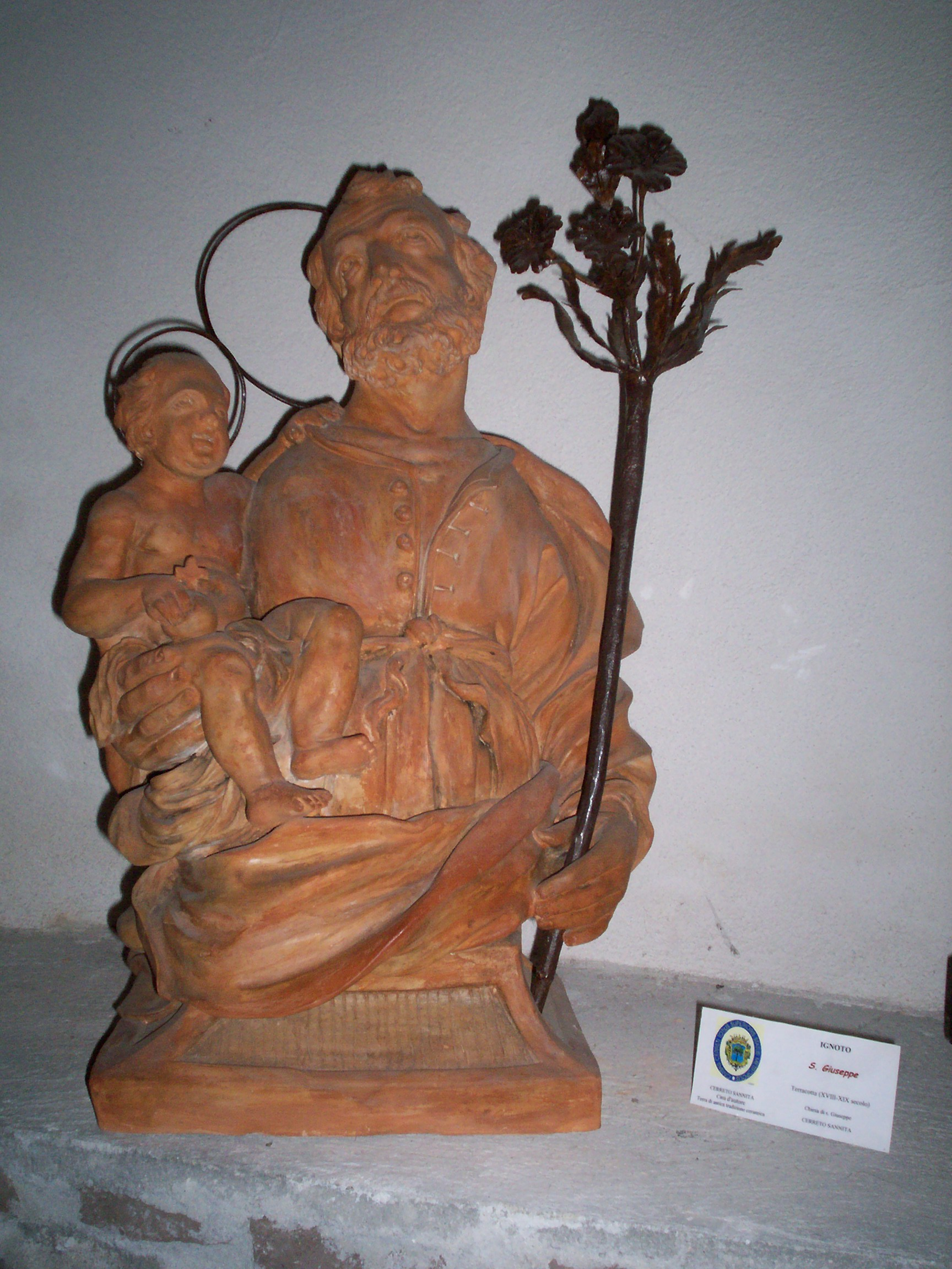 statuetta in terracotta di San Giuseppe nel museo civico di Cerreto Sannita